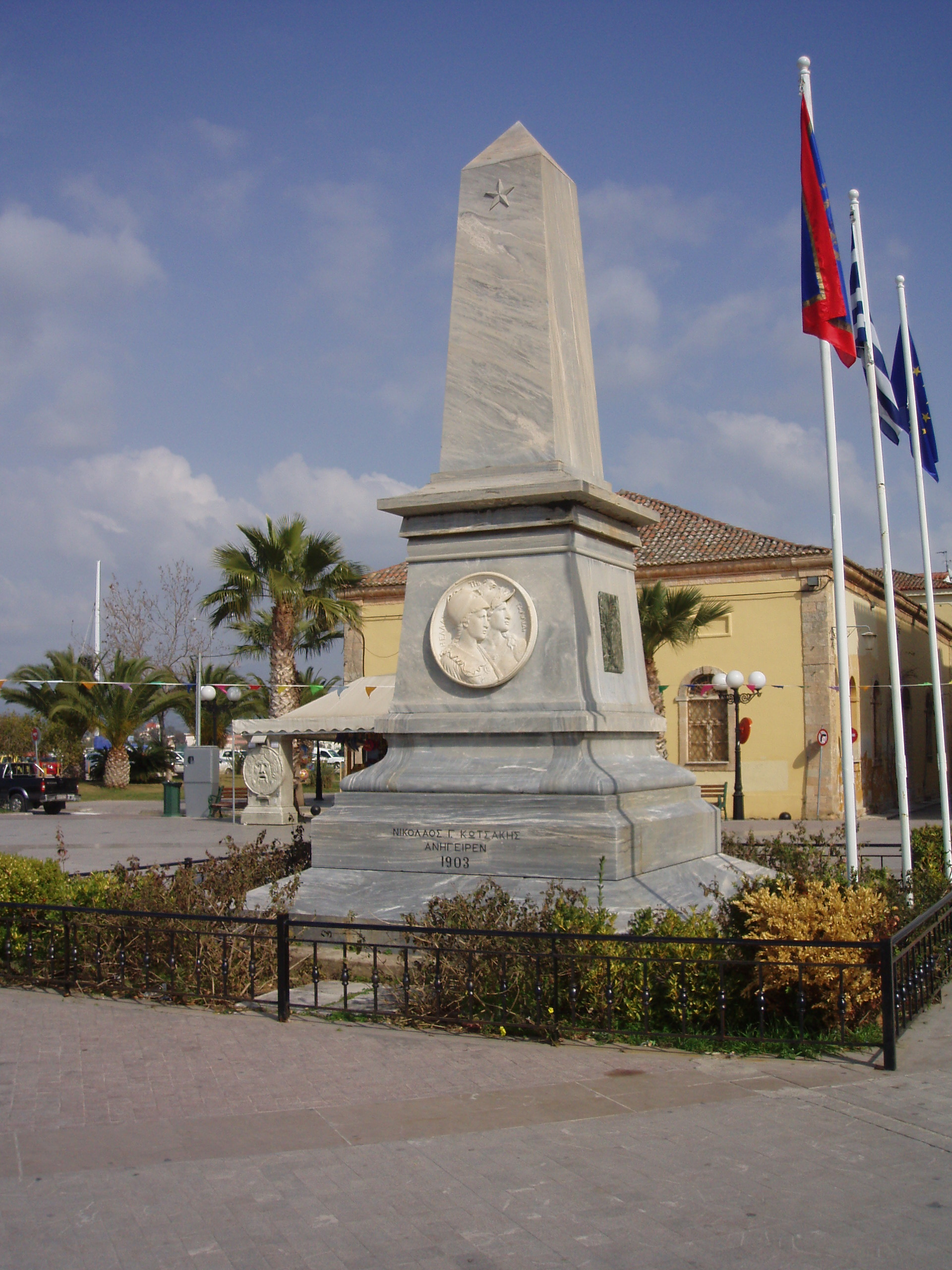 Denkmal in Nauplia. « Monument à la mémoire du maréchal Maison, du général Fabvier, de l'amiral de Rigny et des marins et soldats français morts pour l’indépendance hellénique ».